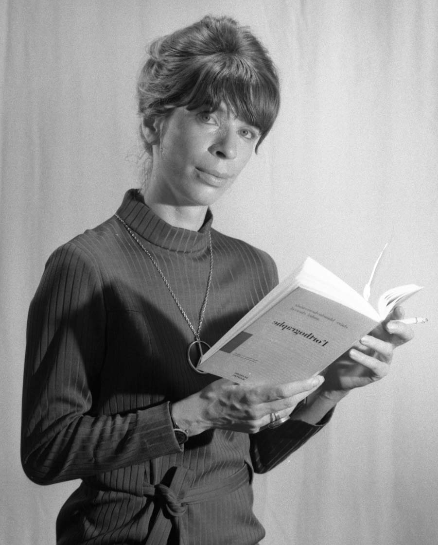 Portrait photographique de Claire Blanche-Benveniste